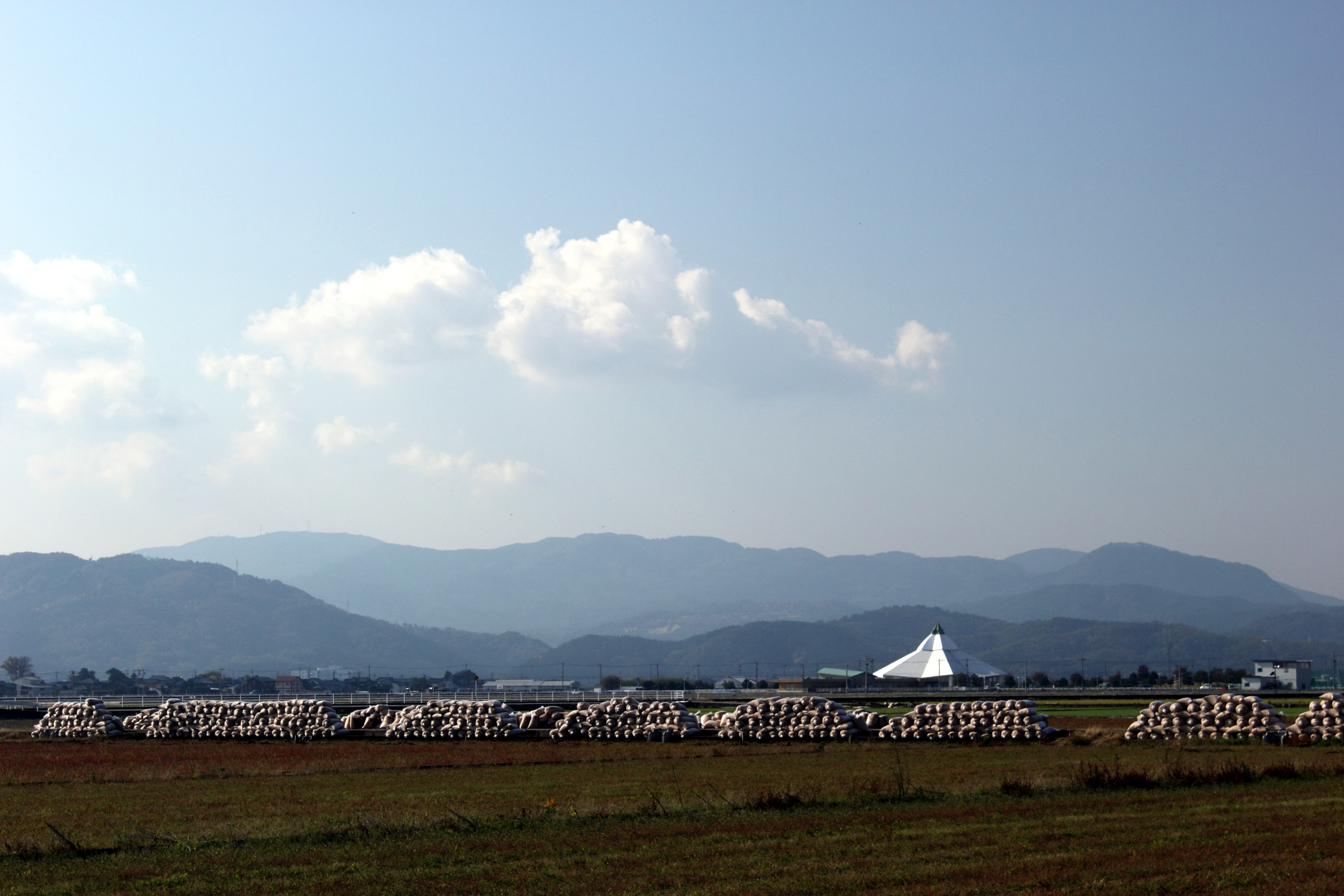 福井平野より見える丹生山地（後方左が国見岳）